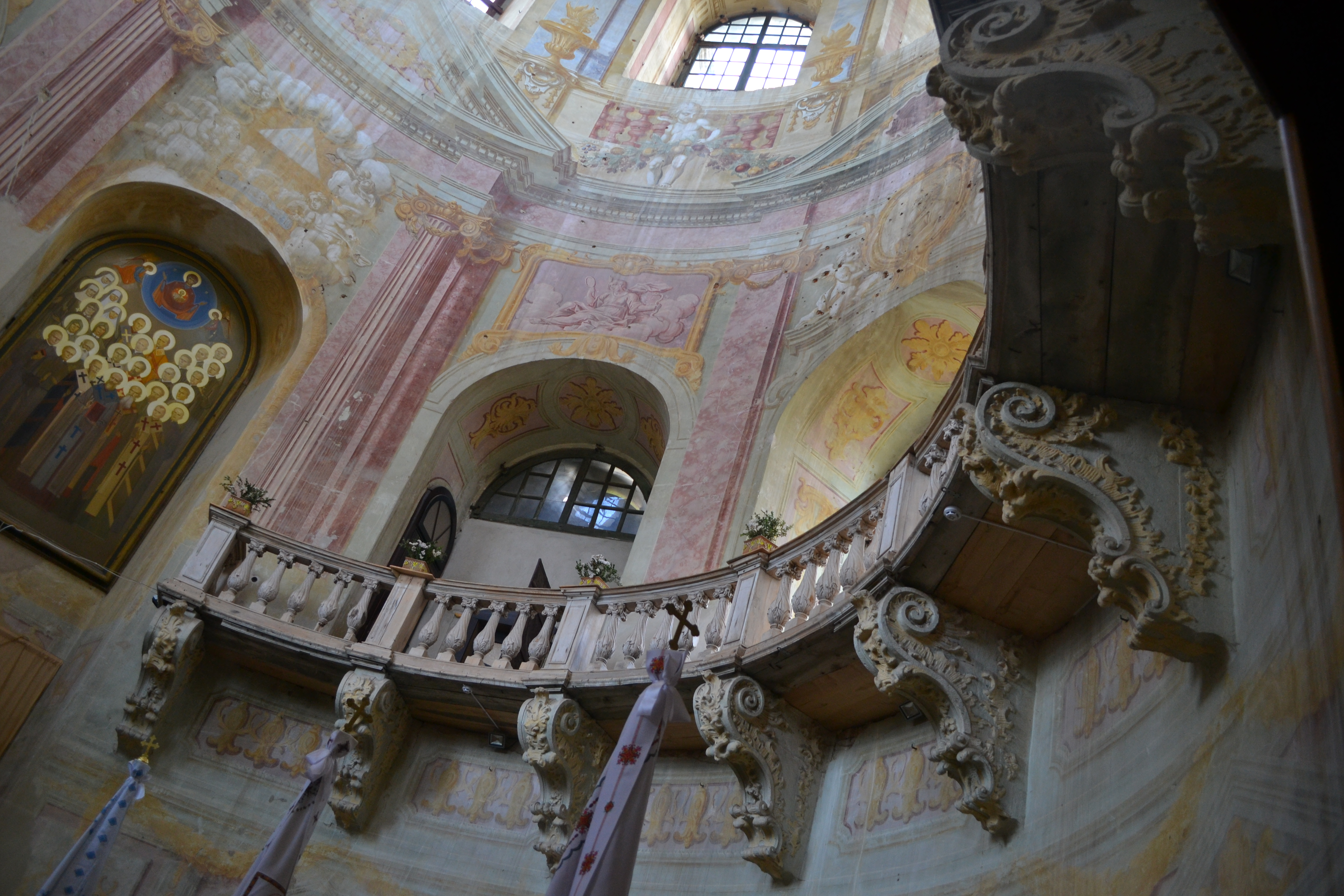 Підгірці